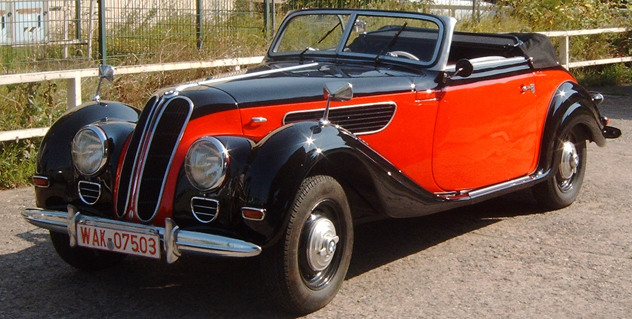 Beschreibung: Eisenach, 04.09.2004 Quelle: selbst fotografiert beim EMW 340 Treffen Fotograf: Harald Spiegel Andere Versionen: innenraum von rechts und links, totale-weit 17:14, 26. Apr 2005 DirtyHarry 1257 x 636 (315259 Byte) (*Beschreibung: Eisenach, 04.09.2004 *Quelle: selbst fotografiert beim EMW 340 Treffen *Fotograf: Harald Spiegel *Andere Versionen: innenraum von rechts und links, totale-weit)